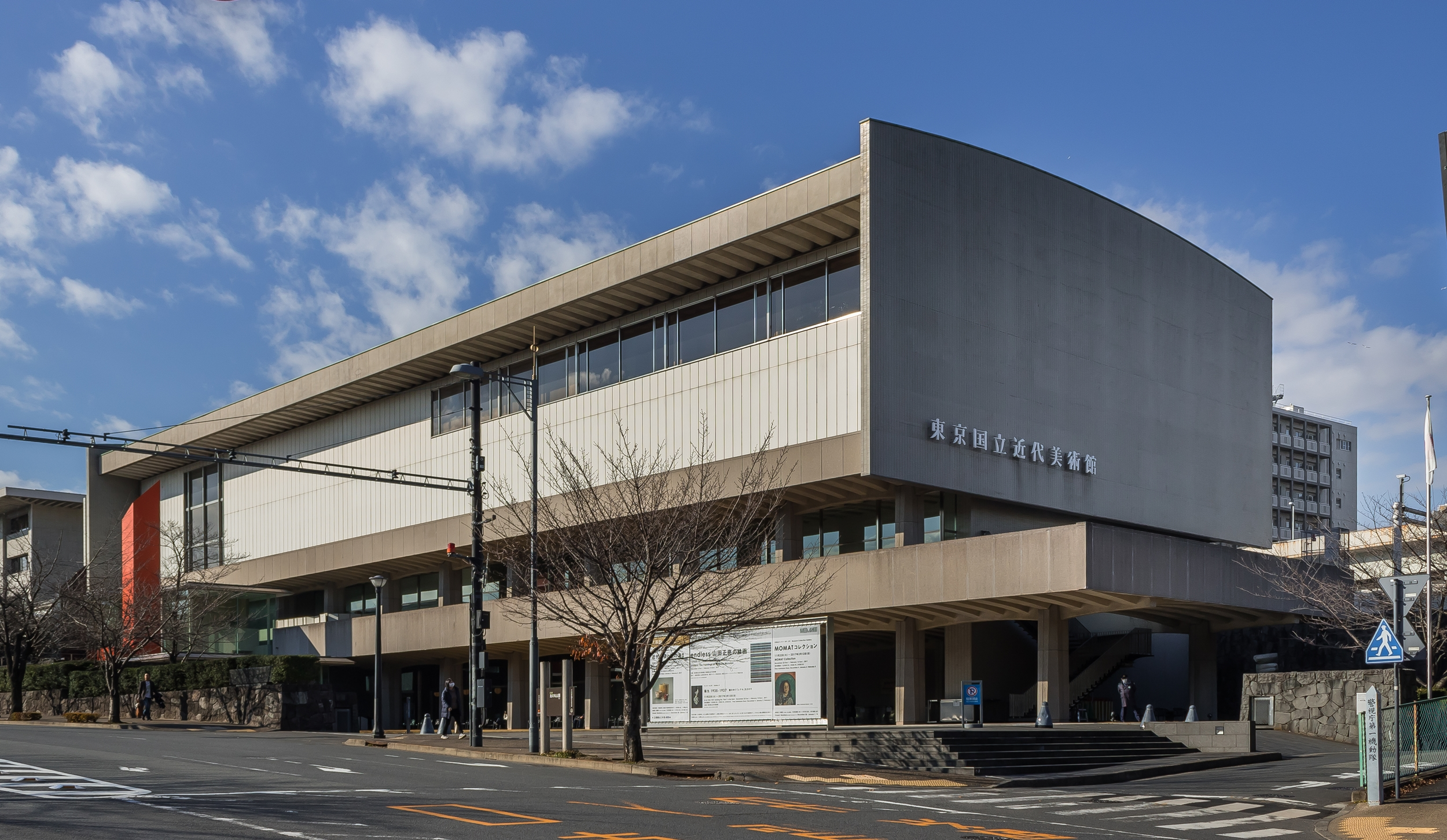 東京国立近代美術館,谷口吉郎(1969年)。